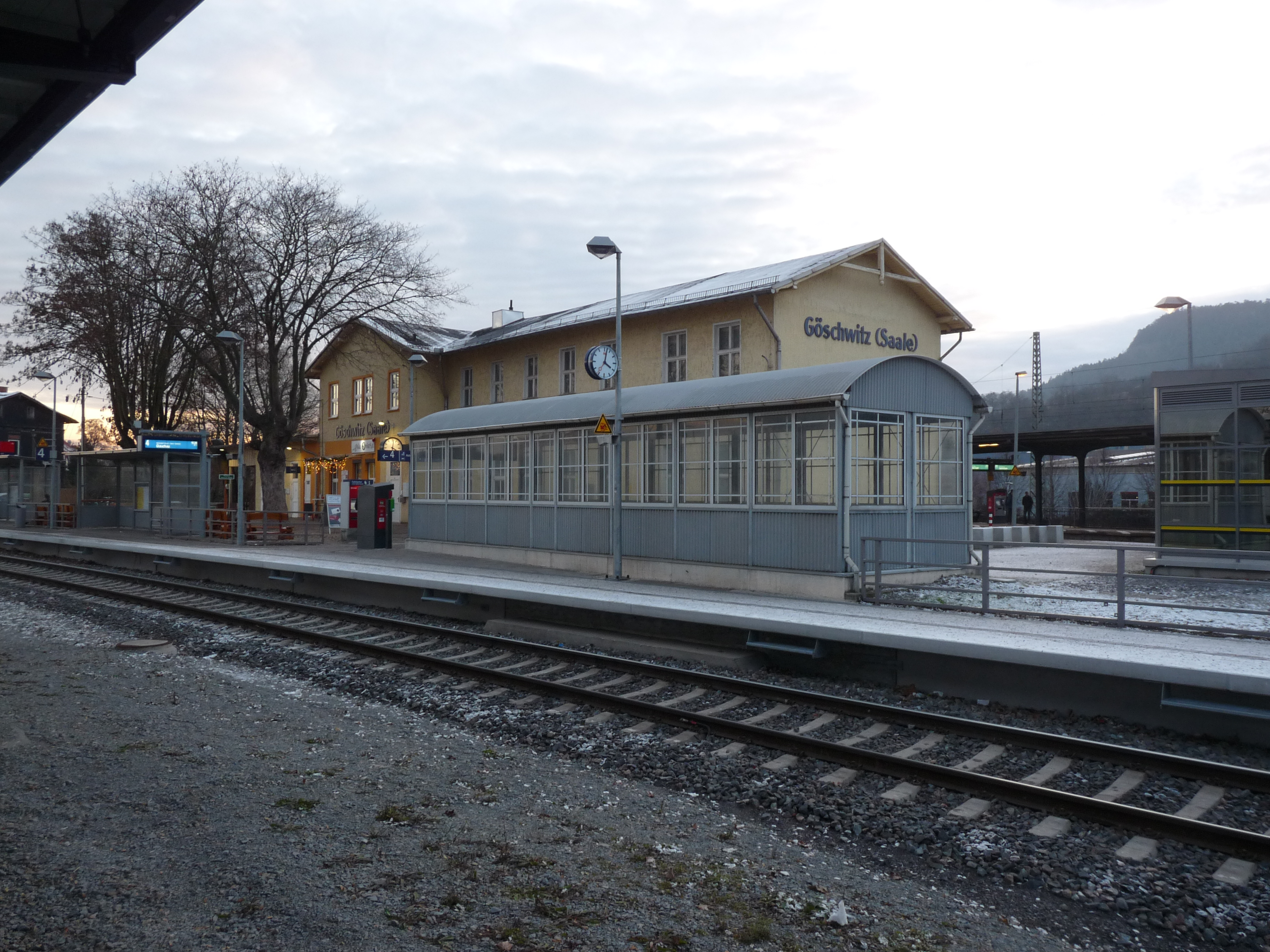 Het stationsgebouw tusen twee spoorlijnen in